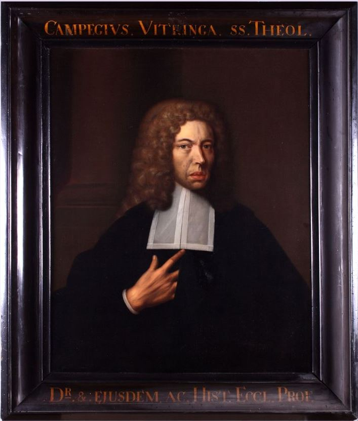 Portret in olieverf van Campegius (Kempe) Vitringa senior, professor Oosterse talen en godgeleerdheid aan de Franeker universiteit van 1681 tot 1722. Campegius Vitringa (Leeuwarden 16 mei 1659 - Franeker 31 maart 1722) werd in 1680 hoogleraar Oosterse talen aan de Franeker universiteit.